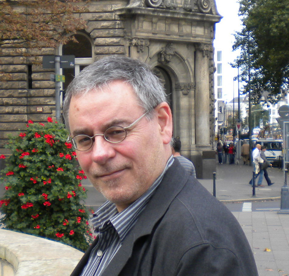 Friedhelm Ruf